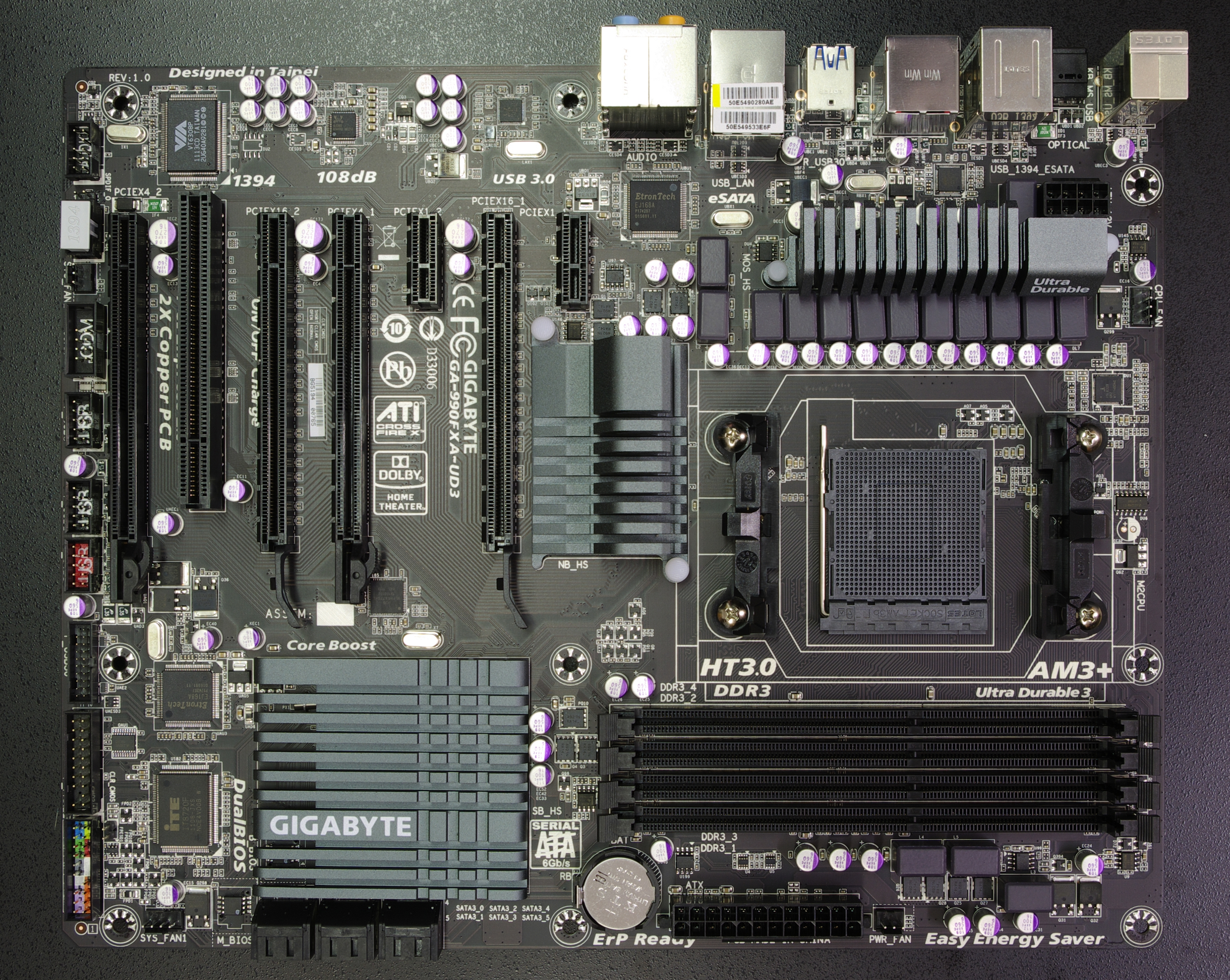 Hauptplatine Gigabyte GA-990FXA-UD3.